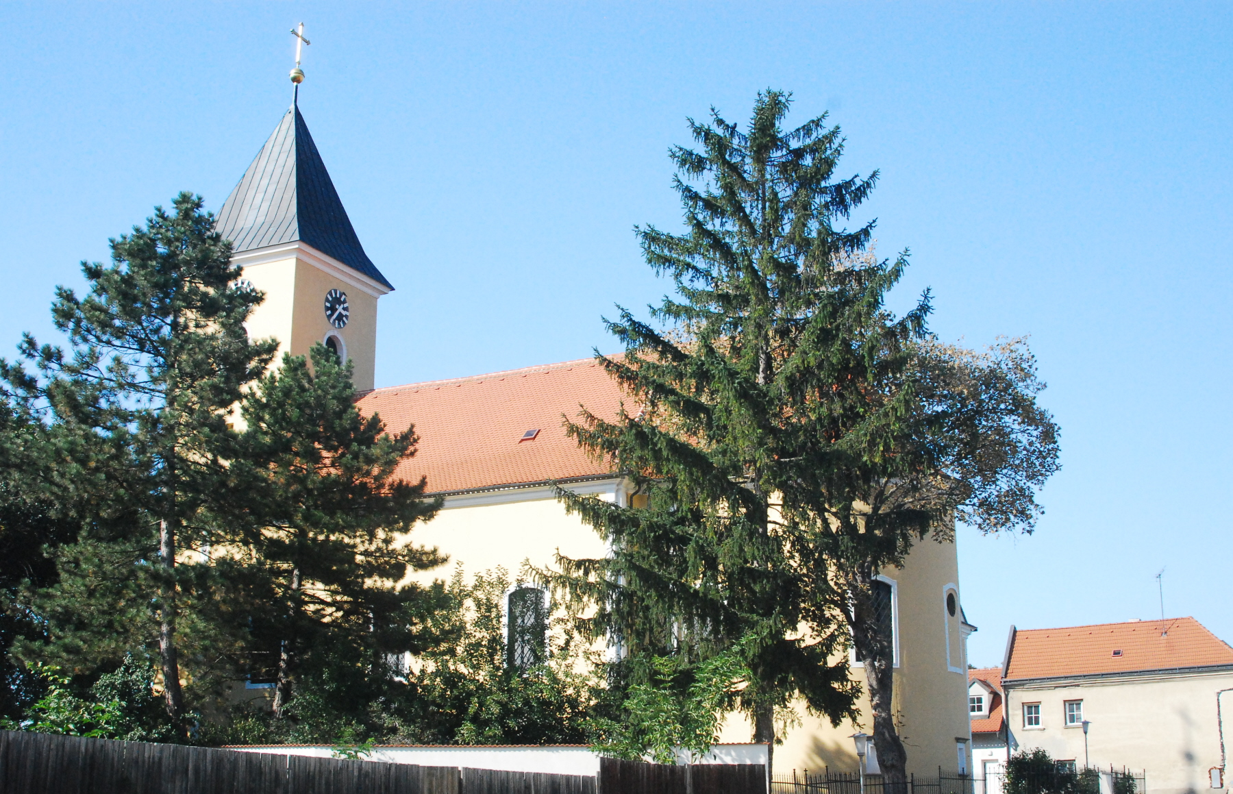 katholische Pfarrkirche heilige Anna